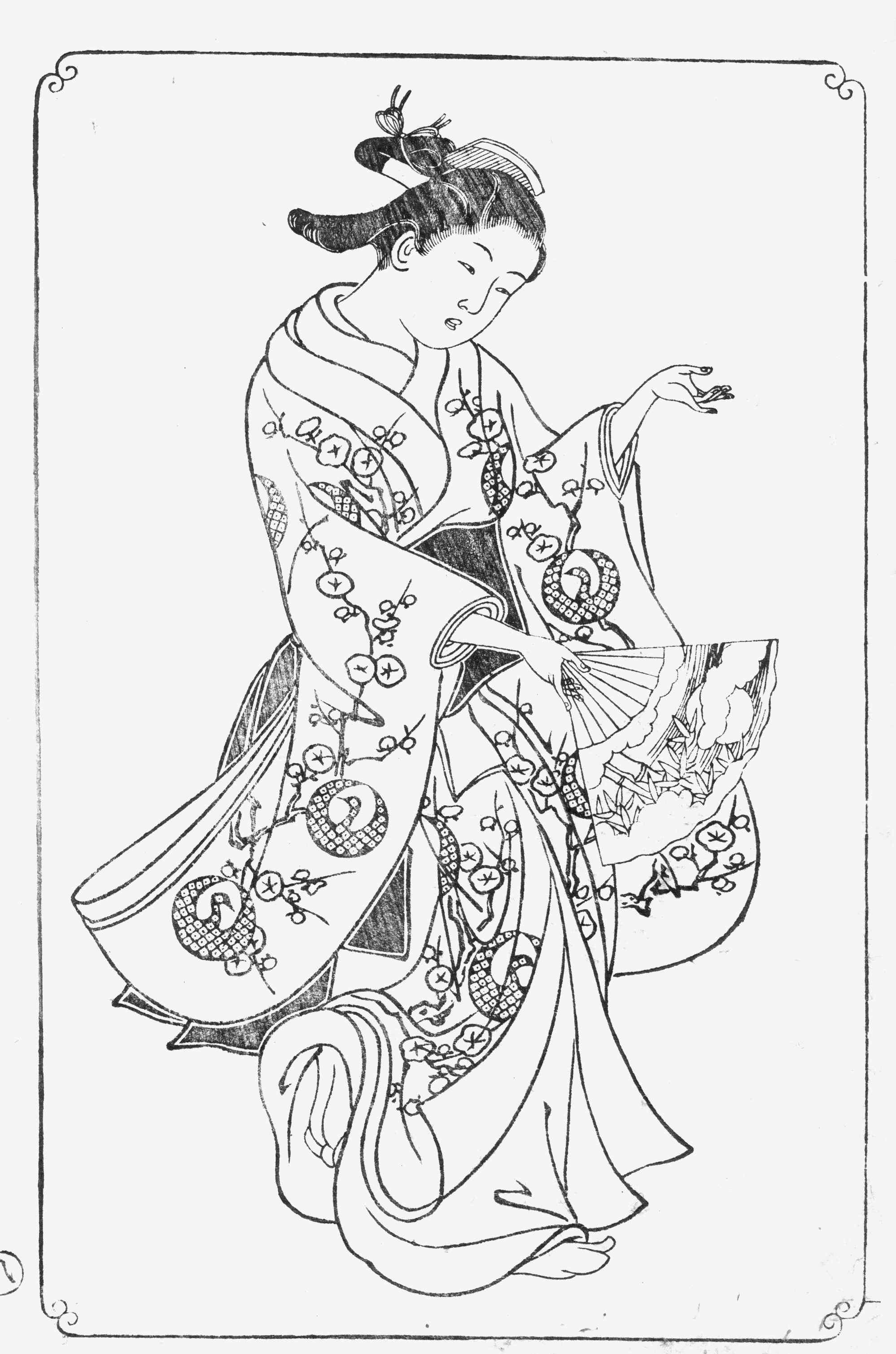 Nishikawa Sukenobu (1671-1751). Dix-septième page de "Ehon Asakayama", première édition, 1739. Volume de 24 gravures en noir (sumizuri-e), deux par feuille repliée, 26,3 x 18,3 x 0,6 cm (format du livre) 15 x 24,3 cm (format des gravures). Volume considéré comme la plus importante série de bijin-ga réalisée par Sukenobu. Asakayama peut être traduit de manière poétique : Parfum de la Montagne de l'Aube, formule exprimant le "parfum" intoxicant des beautés féminines contenues dans ce livre. Bibl : Hillier, J : The Art of the Japanese Book London : Sotheby's Publications, 1987, pp. 158-173.